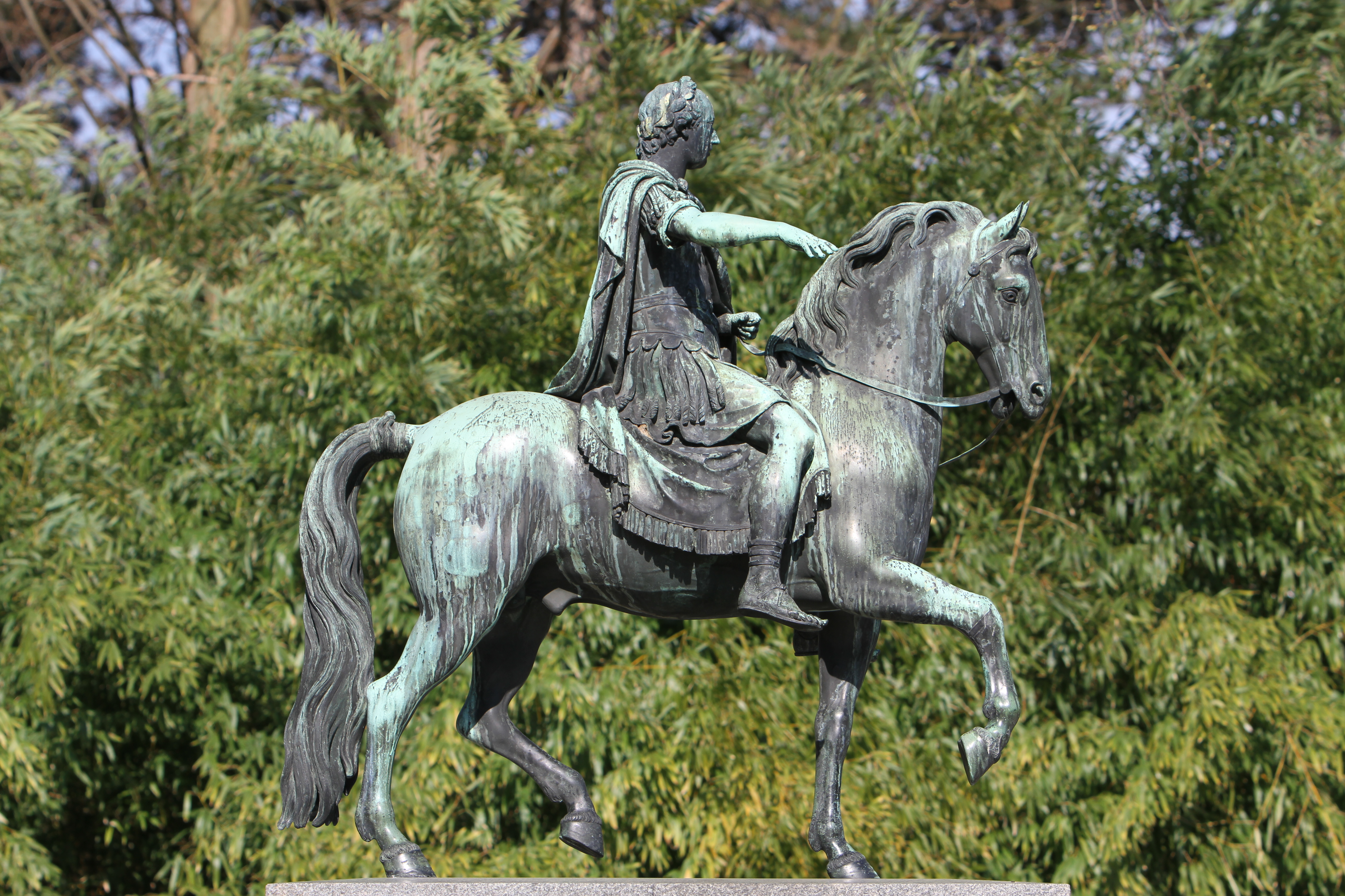 Kaiser Joseph II. (Modell)